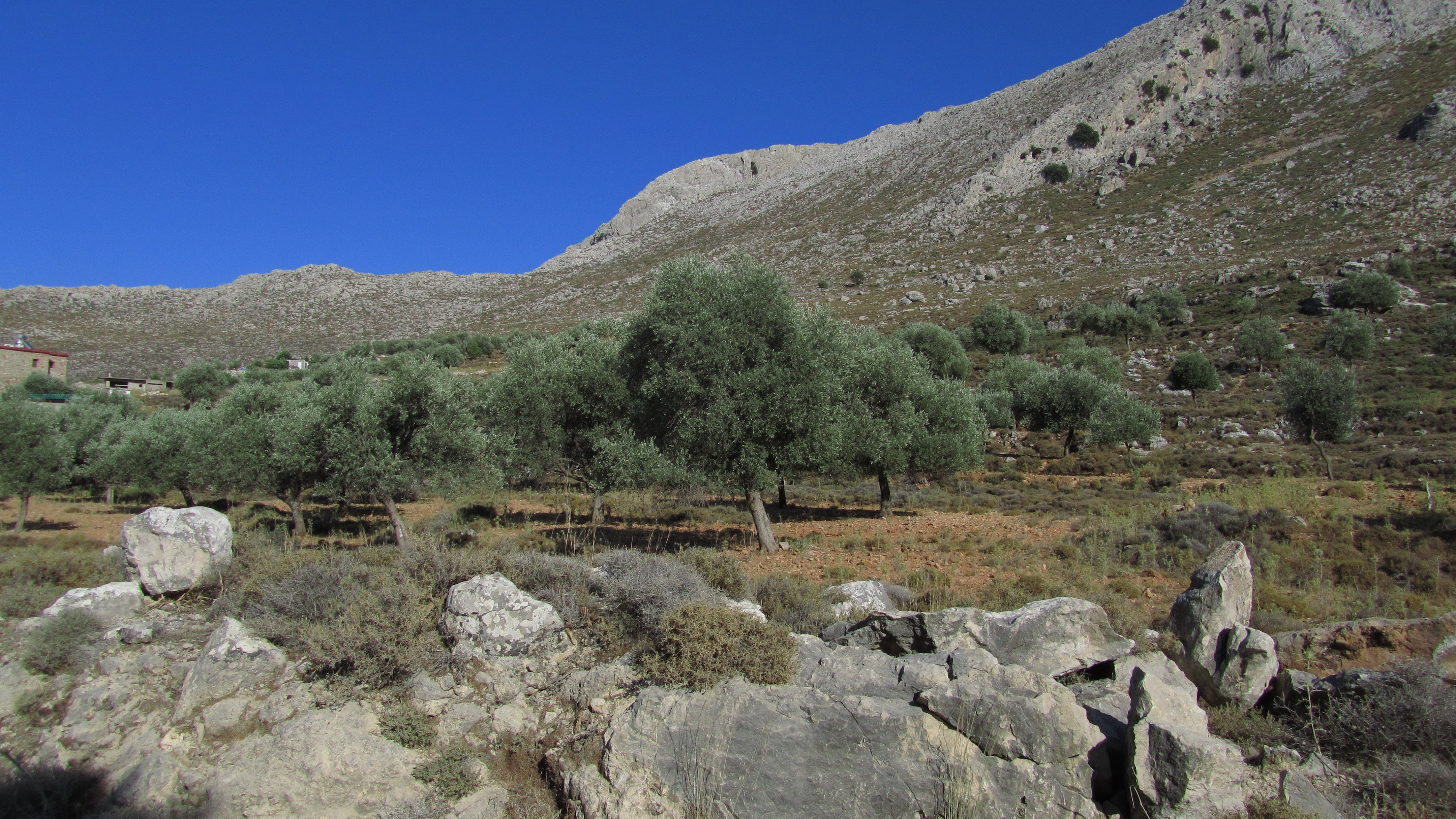 Olive trees in Arhangelos